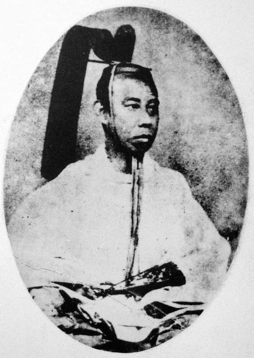 a Japanese man 松平春嶽 (Shungaku Matsudaira)